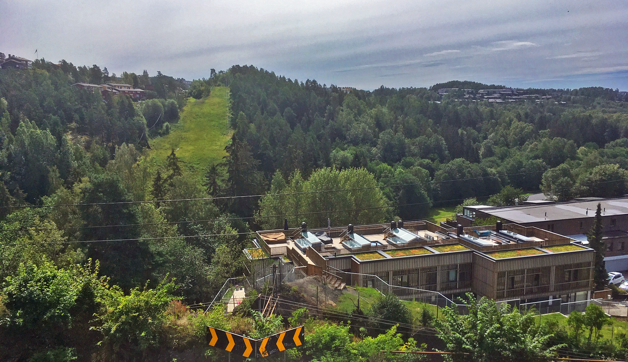 Liadalen i Oslo, sett fra Ljabruveien mot sør-øst. Til venstre i bakgrunnen Sloreåsen slalombakke.